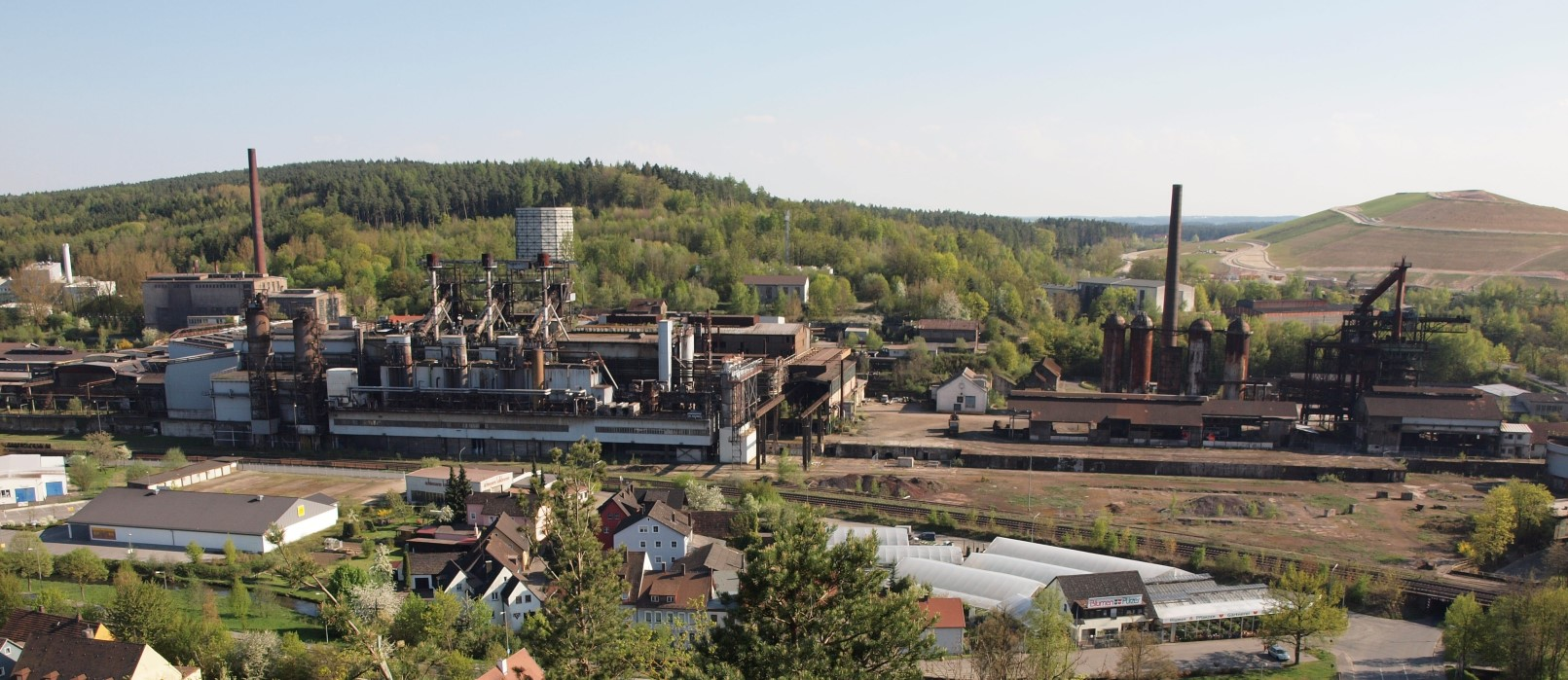 Maxhütte Sulzbach-Rosenberg in 2011 - der "Rückbau" (Abriss) ist bereits deutlich zu erkennen. Leider noch mehr im Inneren.